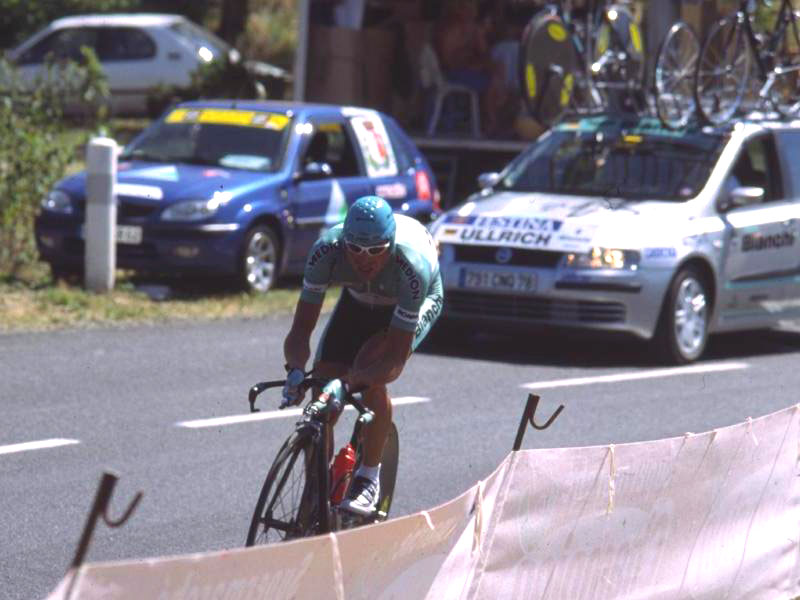 Jan Ullrich beim Zeitfahren der Tour de France 2003 in Gaillac.